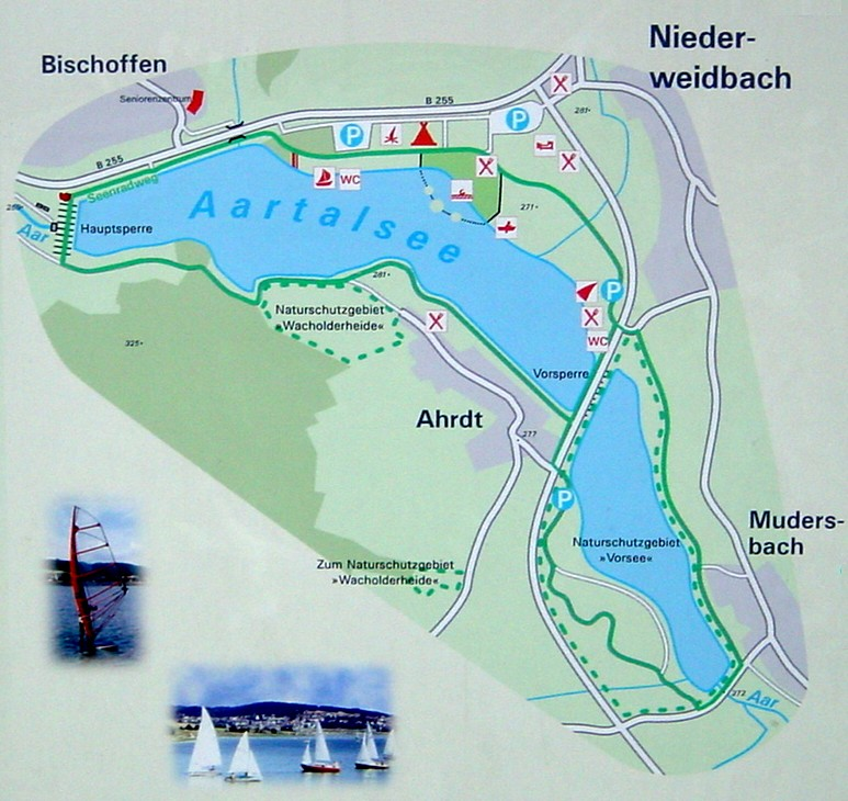 Lageplan der Aartalsperre